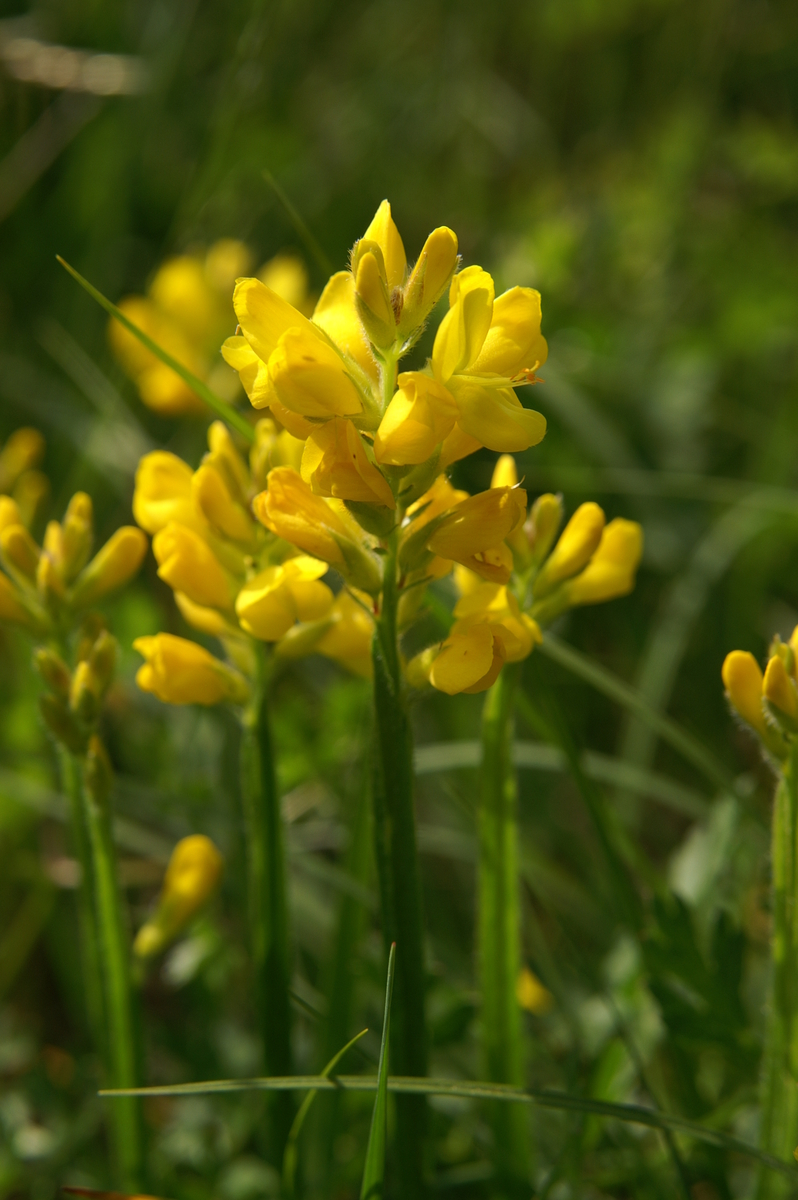 Navadna prevezanka na Toškem Čelu.